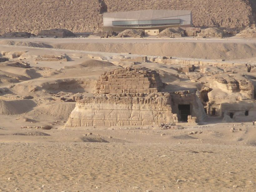 Vue du complexe funéraire de la reine Khentkaous Ire - Gizeh - IVe dynastie égyptienne - juillet 2004